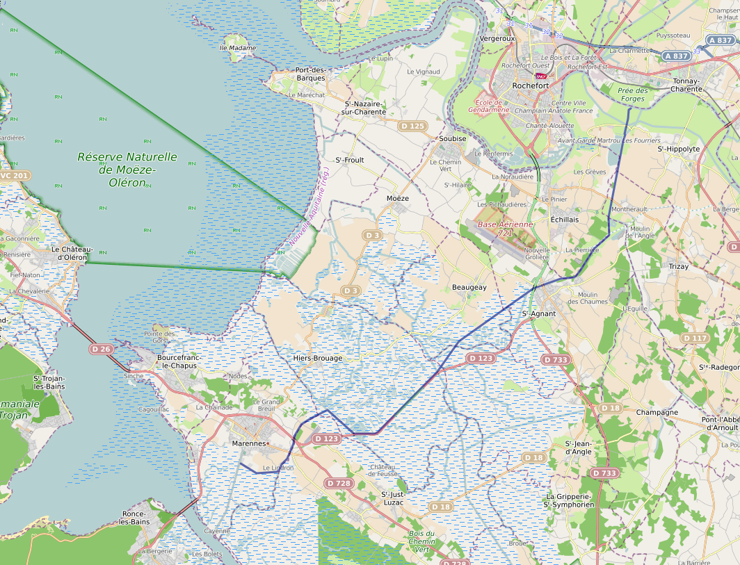 Tracé du canal de la Charente à la Seudre (Charente-Maritime - France).